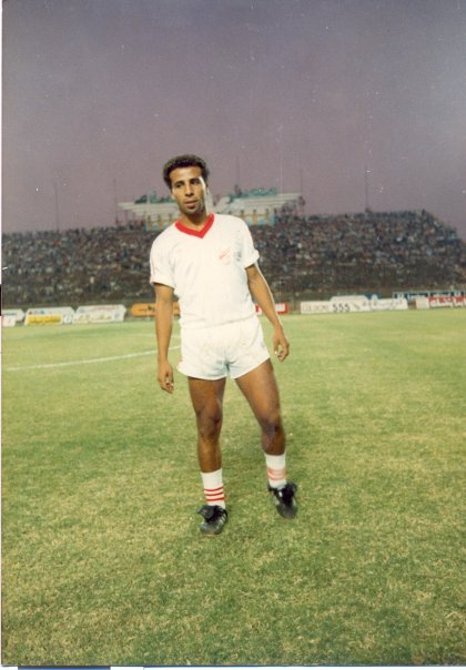 Hergal equipe nationale